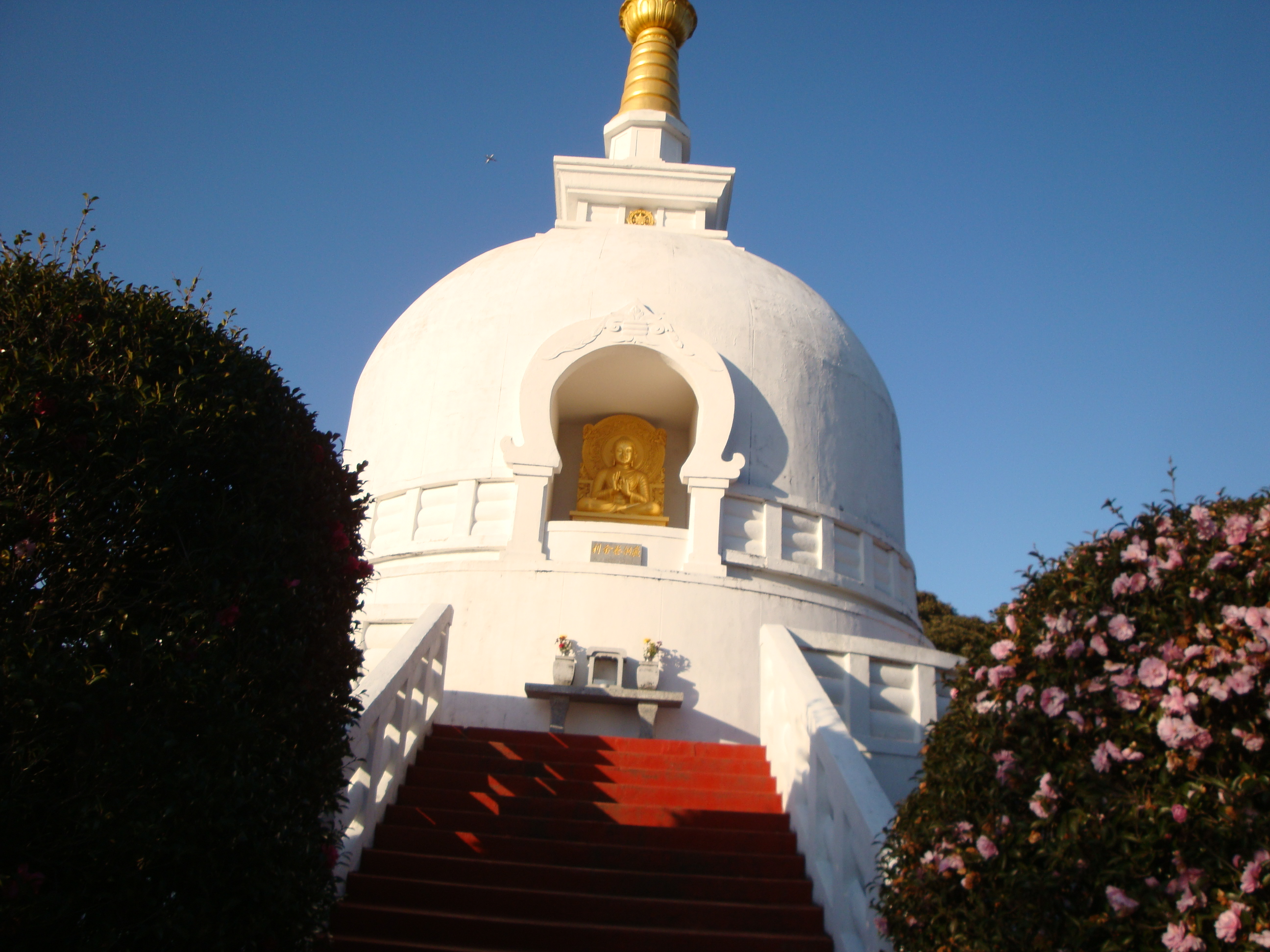 2012年に龍口寺の仏舎利塔